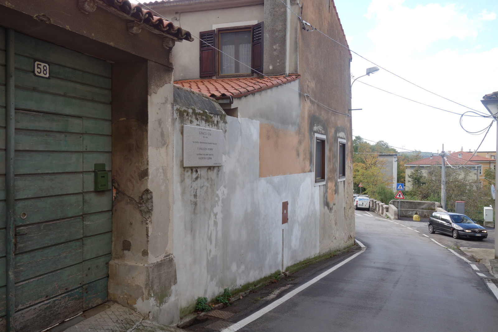 Rojstna hiša skladatelja Ignacija Ote v Dolini pri Trstu